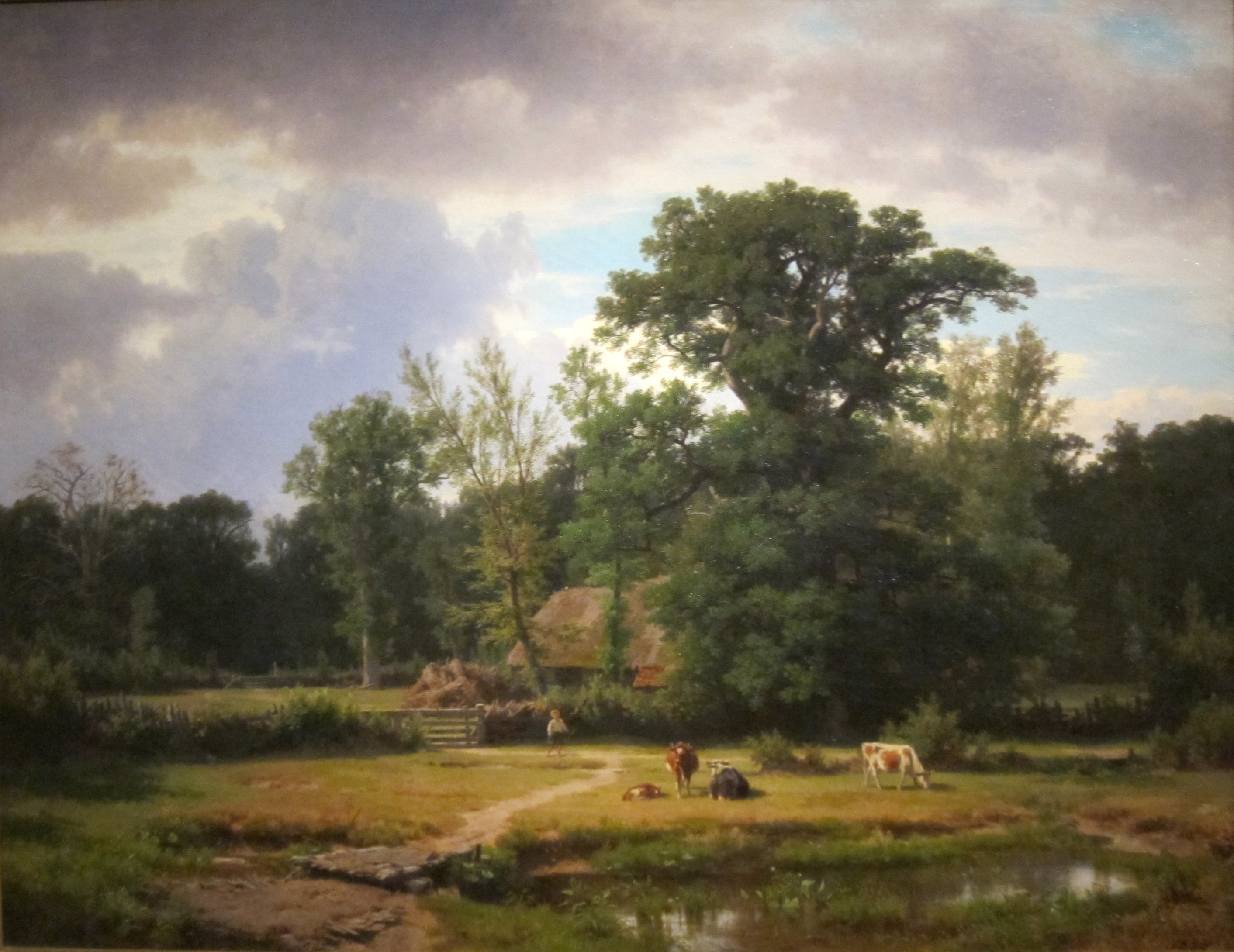 Landscape in Westphalialabel QS:Len,"Landscape in Westphalia" label QS:Lde,"Landschaft in Westfalen"